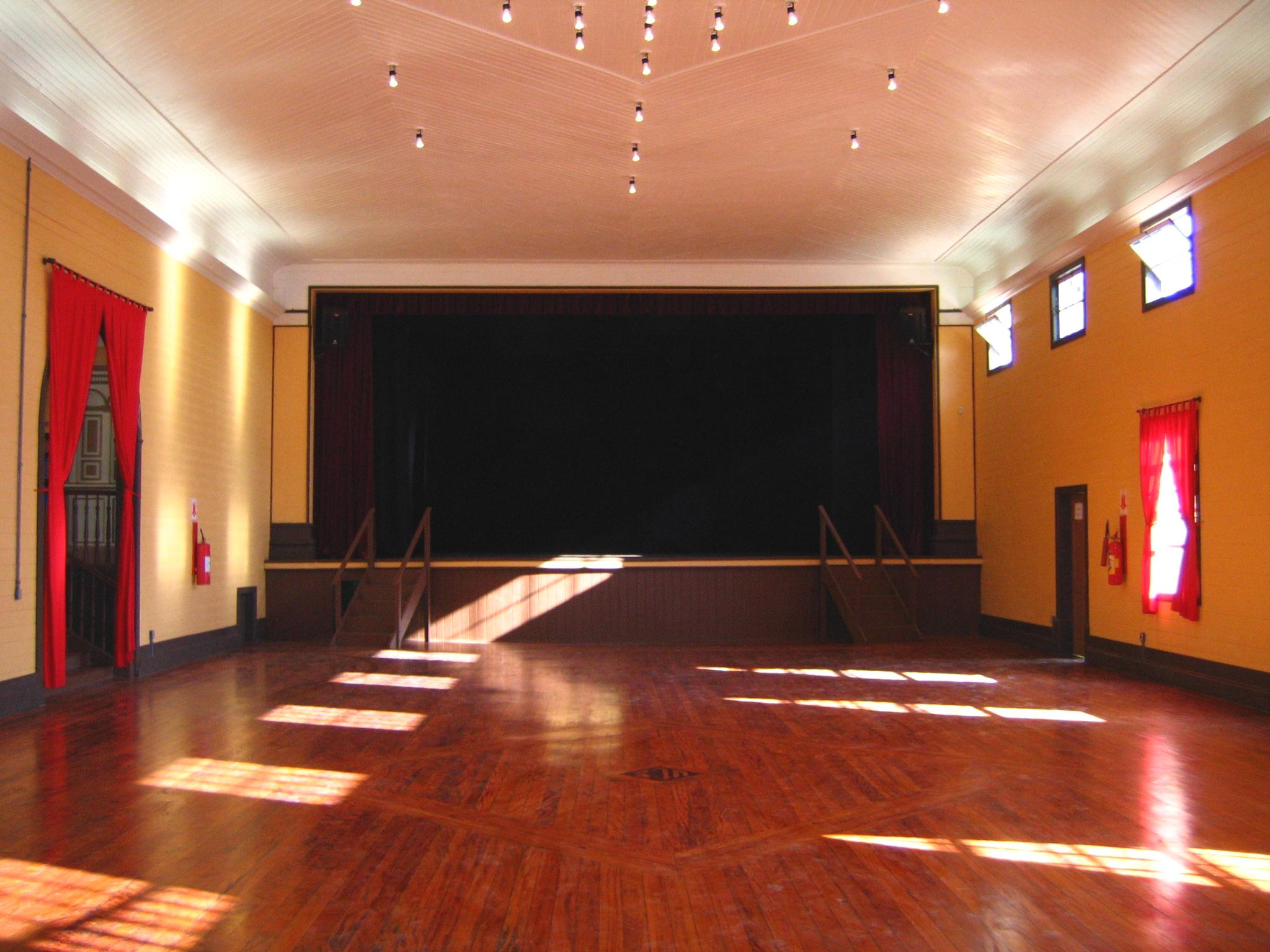 Vista interna do Clube União Lira Serrano de Paranapiacaba